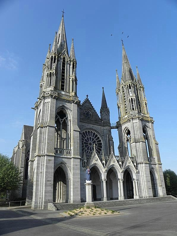 Basilique Notre-Dame d'Espérance de Pontmain (53).